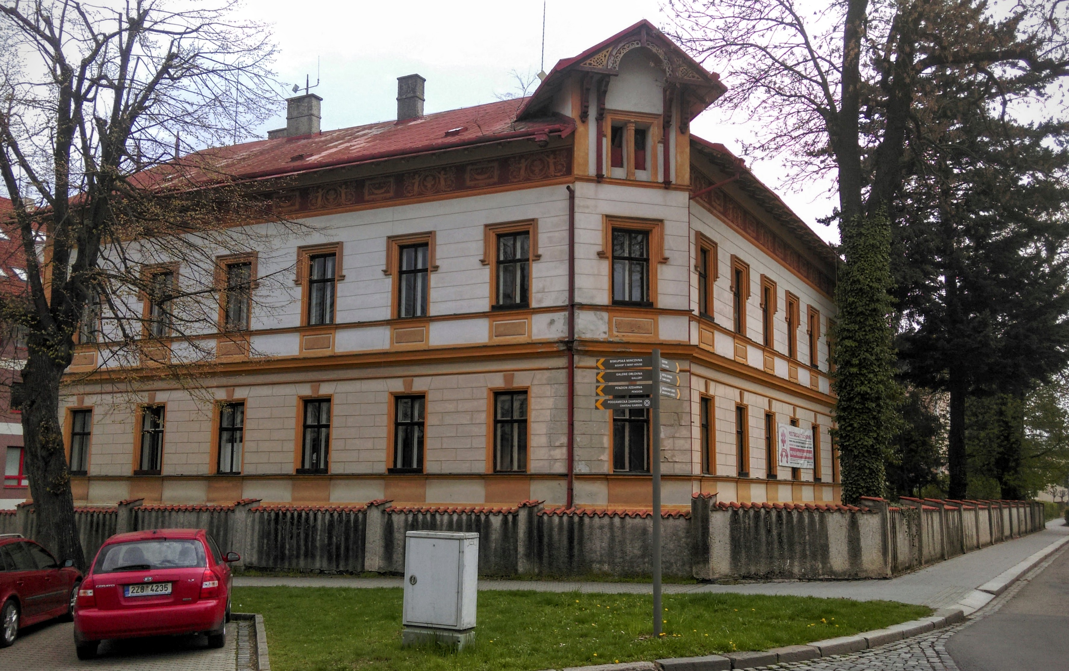 Kozánkova vila v Kroměříži na rohu ulice Generála Svobody a ulice Štěchovice